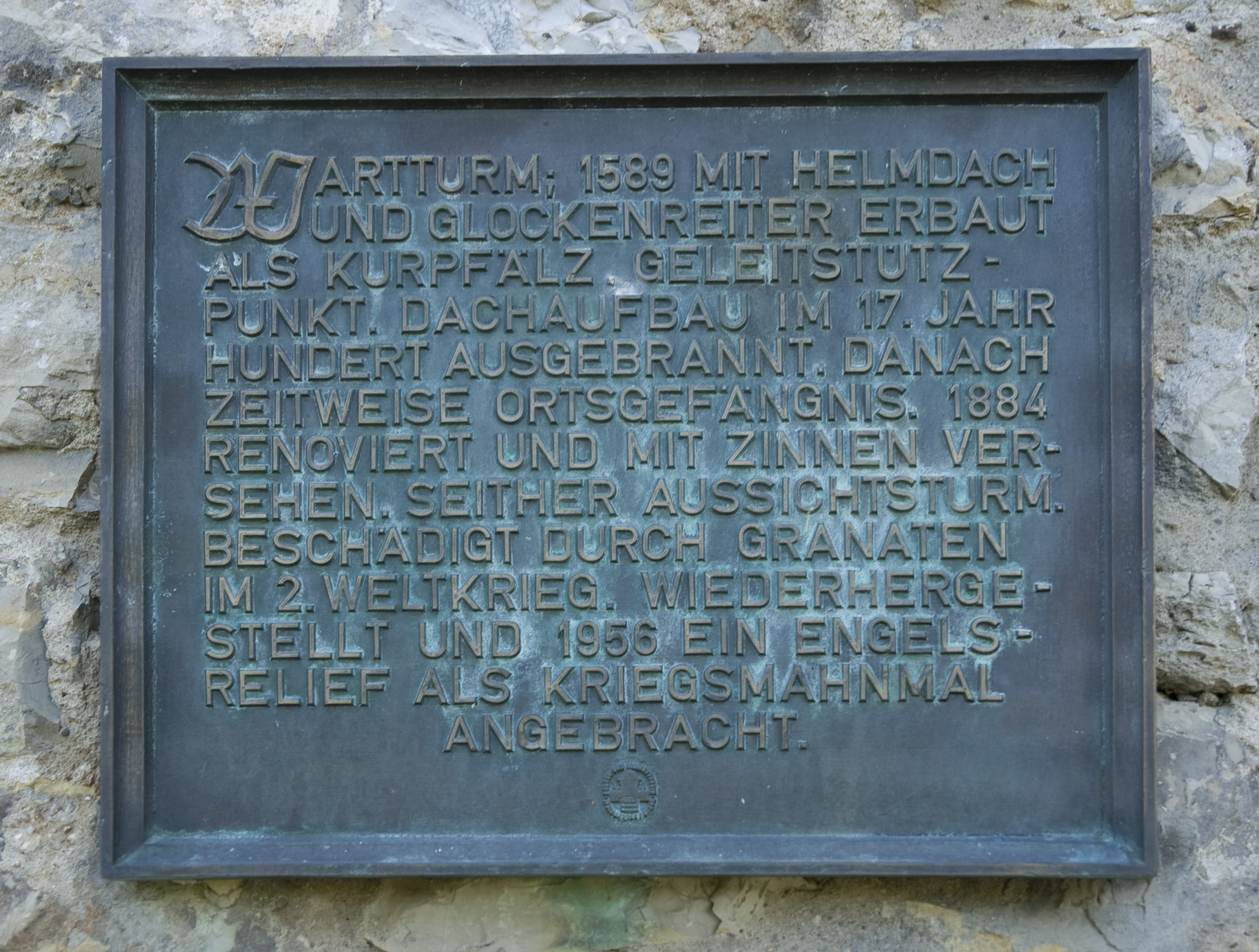 Tafel am Wartturm im badischen Weingarten.